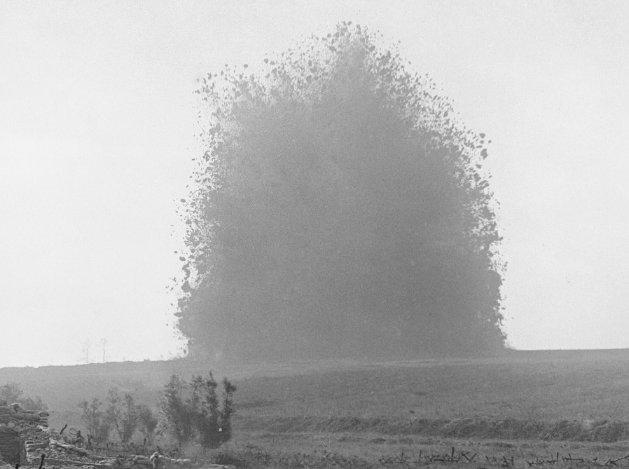 Voladura de la primera galería subterránea bajo el campo de batalla del Somme. 7:20 de la mañana, 1 de julio de 1916. The explosion of the mine beneath Hawthorn Ridge Redoubt on July 1, 1916. See Image:Hawthorn Ridge mine 1 July 1916 2.jpg for a later photograph in this sequence.